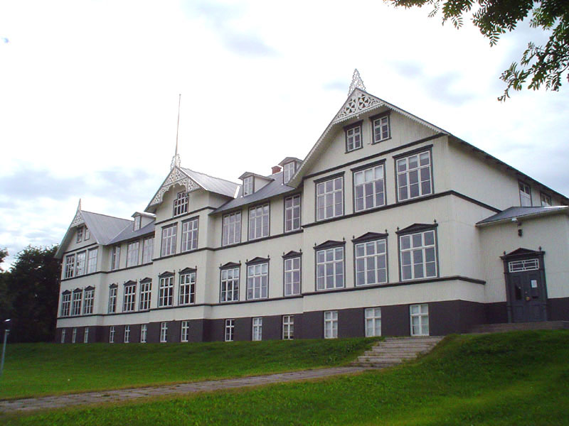 Menntaskólinn á Akureyri, Gamli skóli